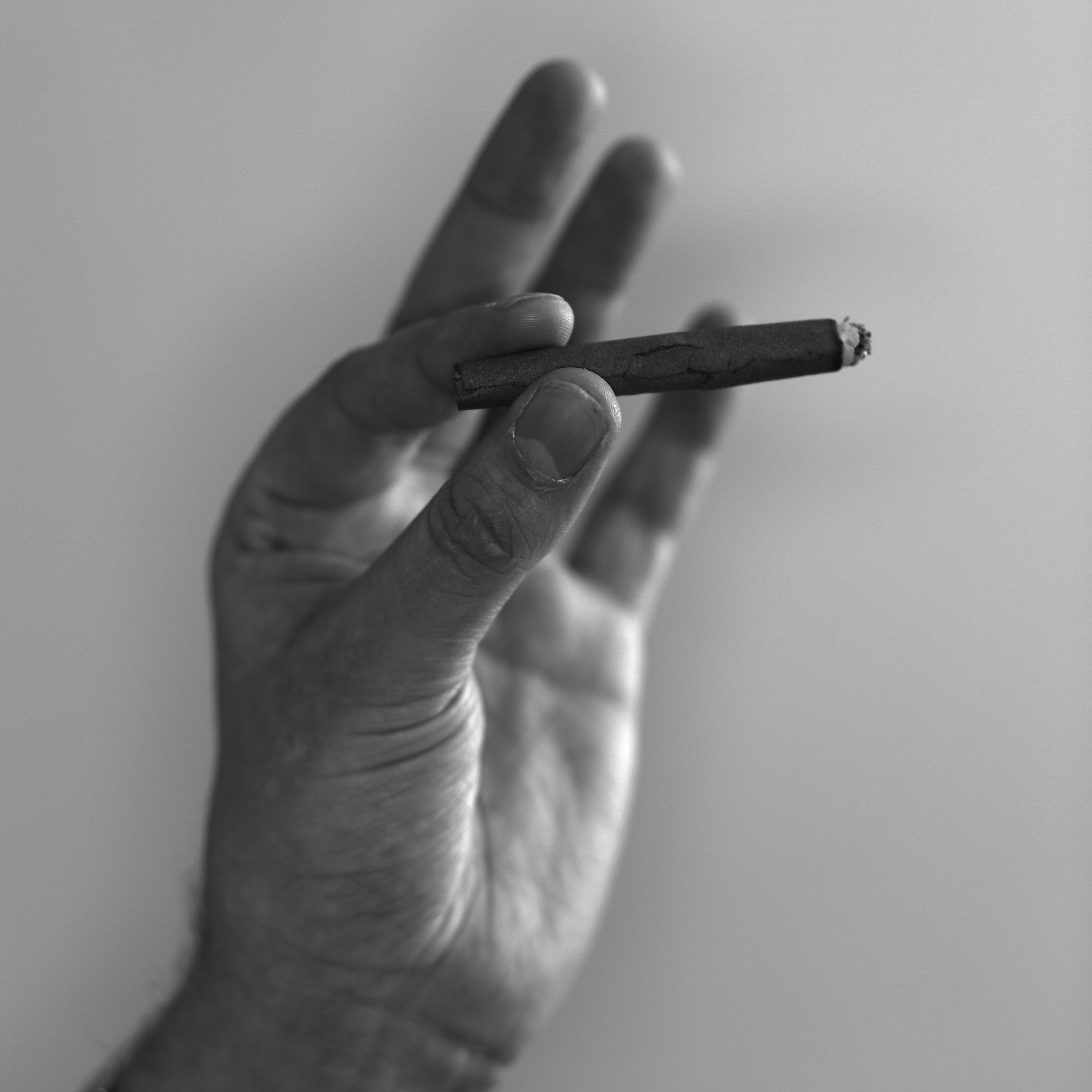 A marijuana blunt